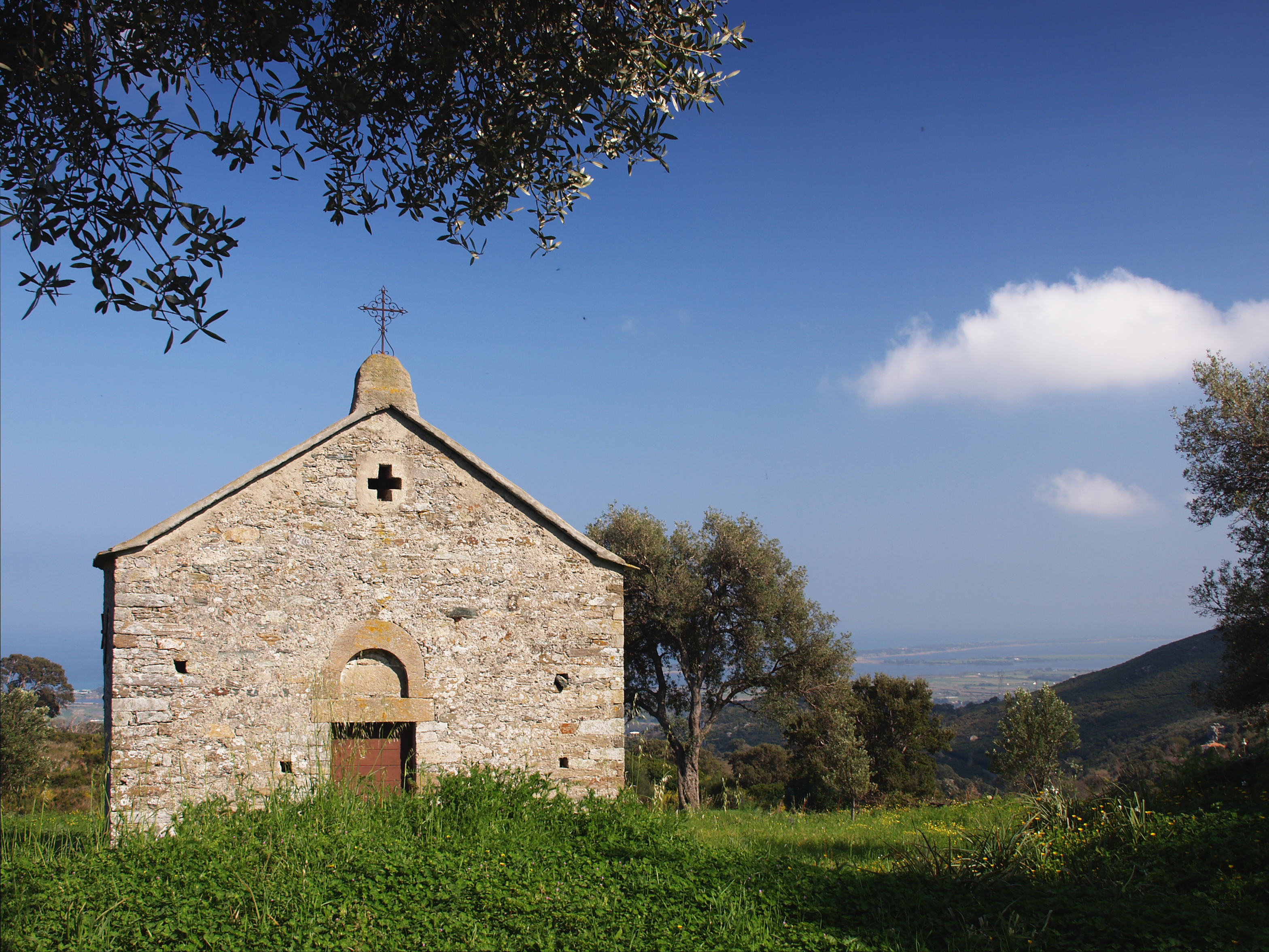 Furiani (Corsica) - Chapelle Sainte-Marie, ancienne église piévane